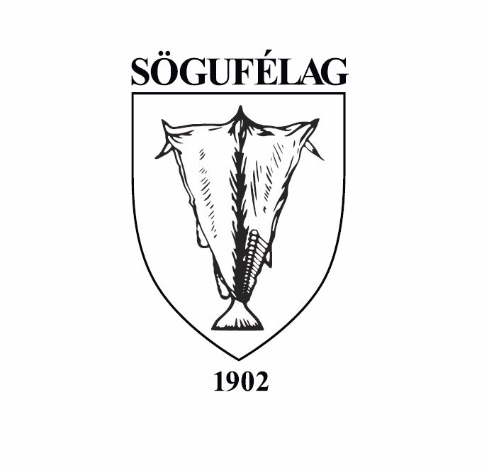 Merki Sögufélags